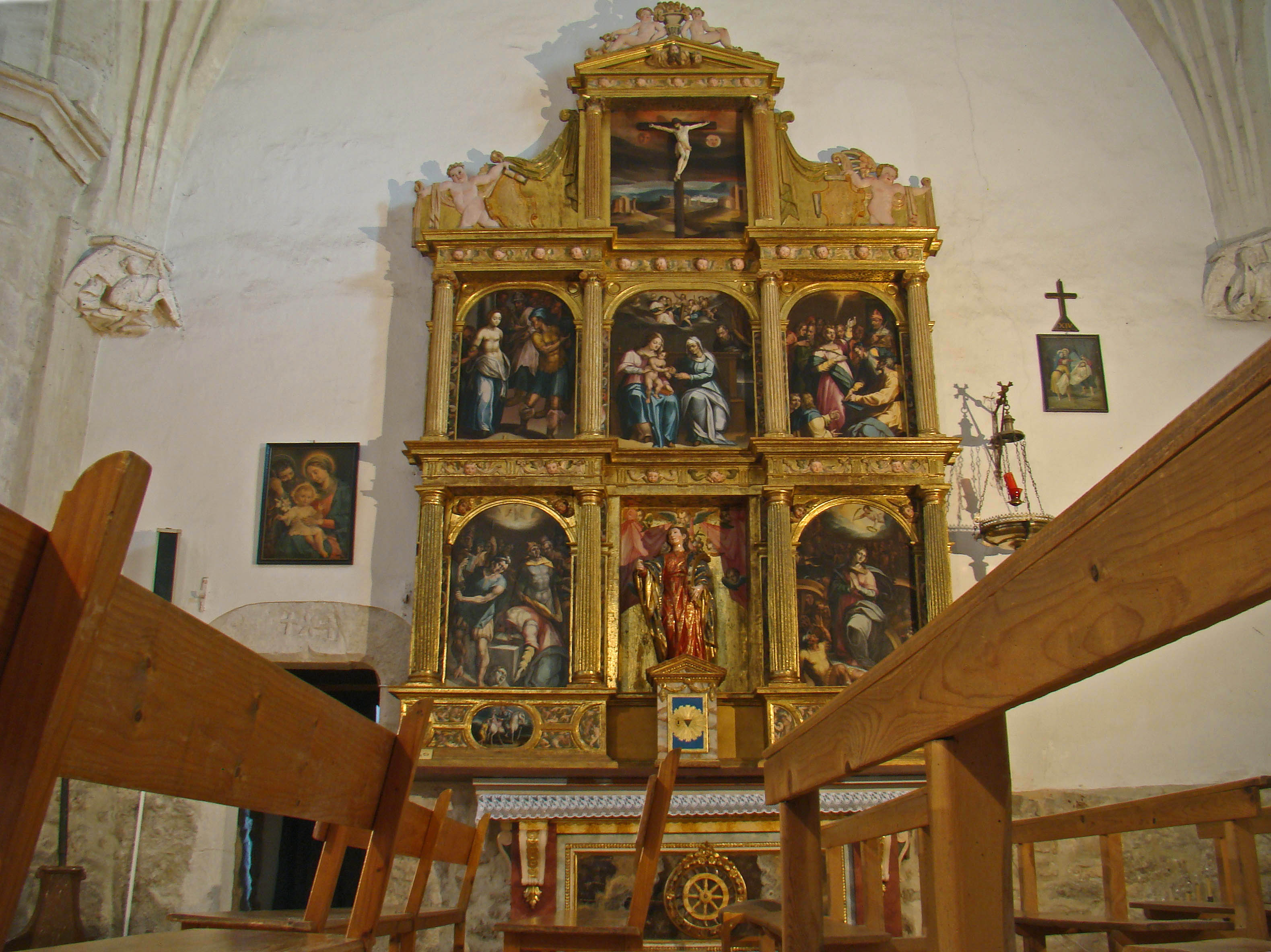 Aldeamayor de San Martín (Valladolid, España). Retablo de Santa Catalina de la iglesia de San Martín de Tours.